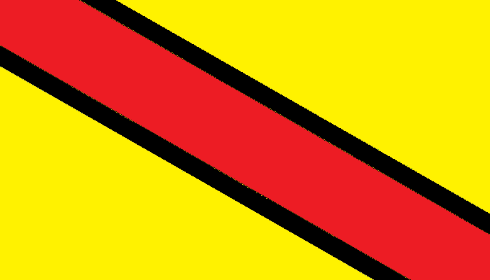 Bandera de Portovelo